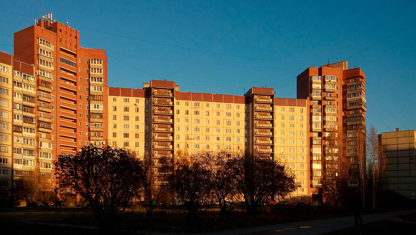 Жилой дом в Санкт-Петербурге по Шлиссельбургскому пр.